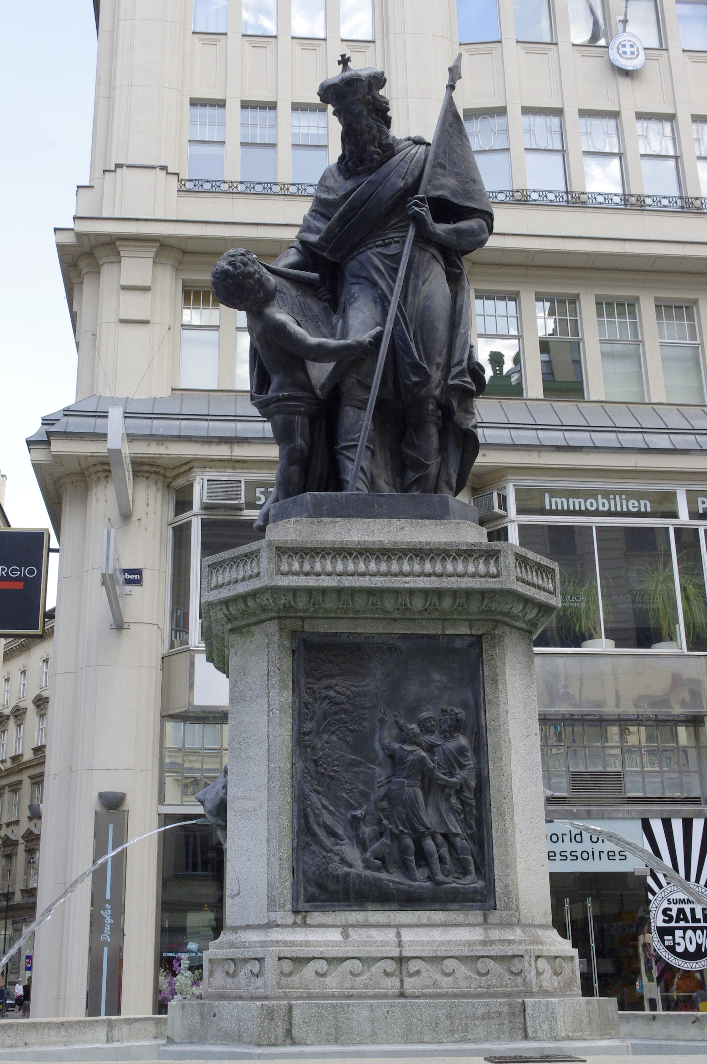 Wien - Graben, Leopoldbrunnen